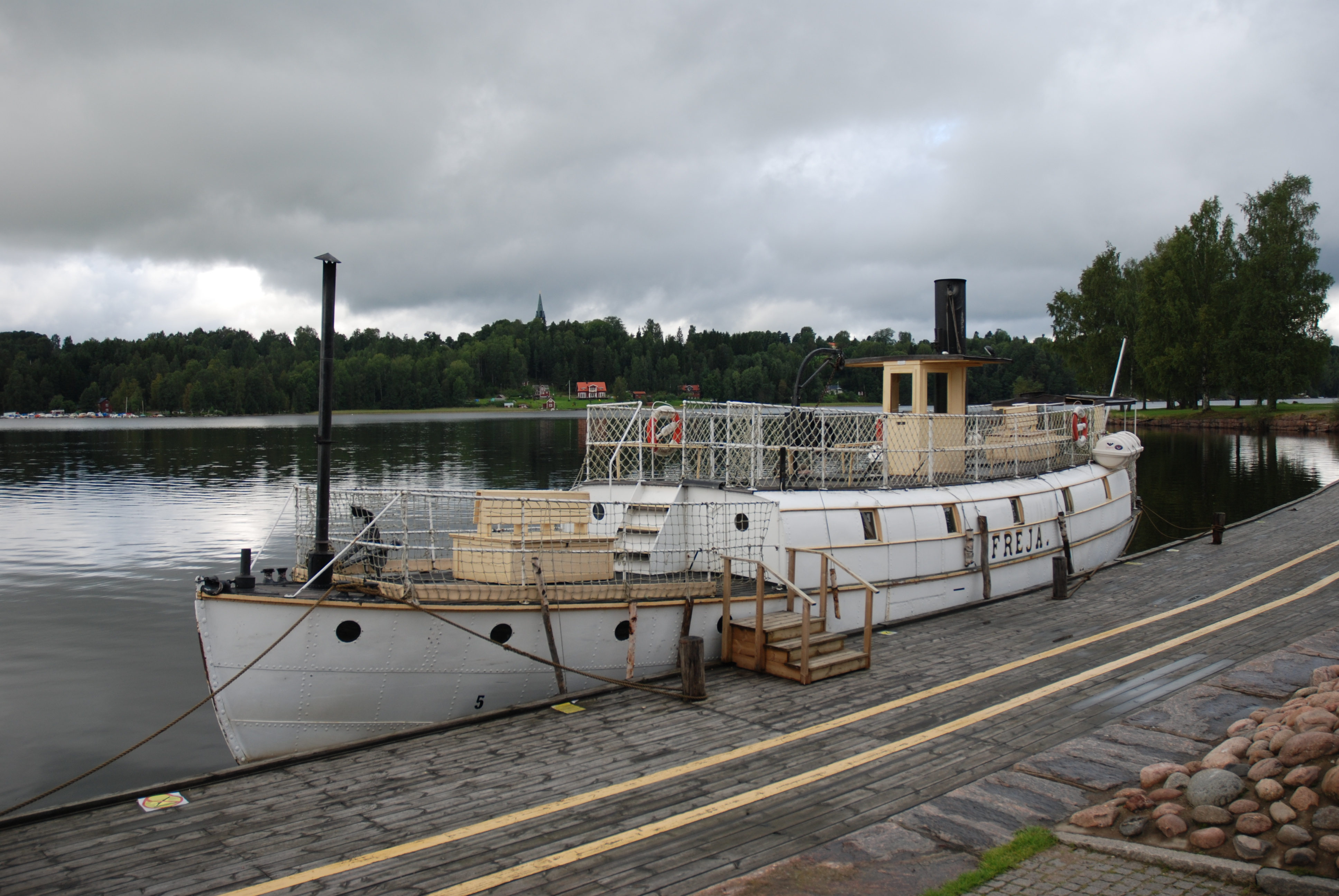 S/S Freja af Fryken, Swedish steamboat in Lake Fryken, Värmland, Sweden